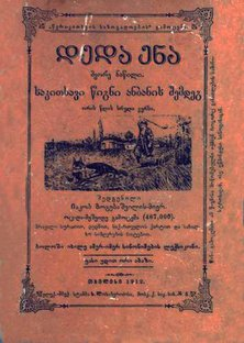 დედა ენა